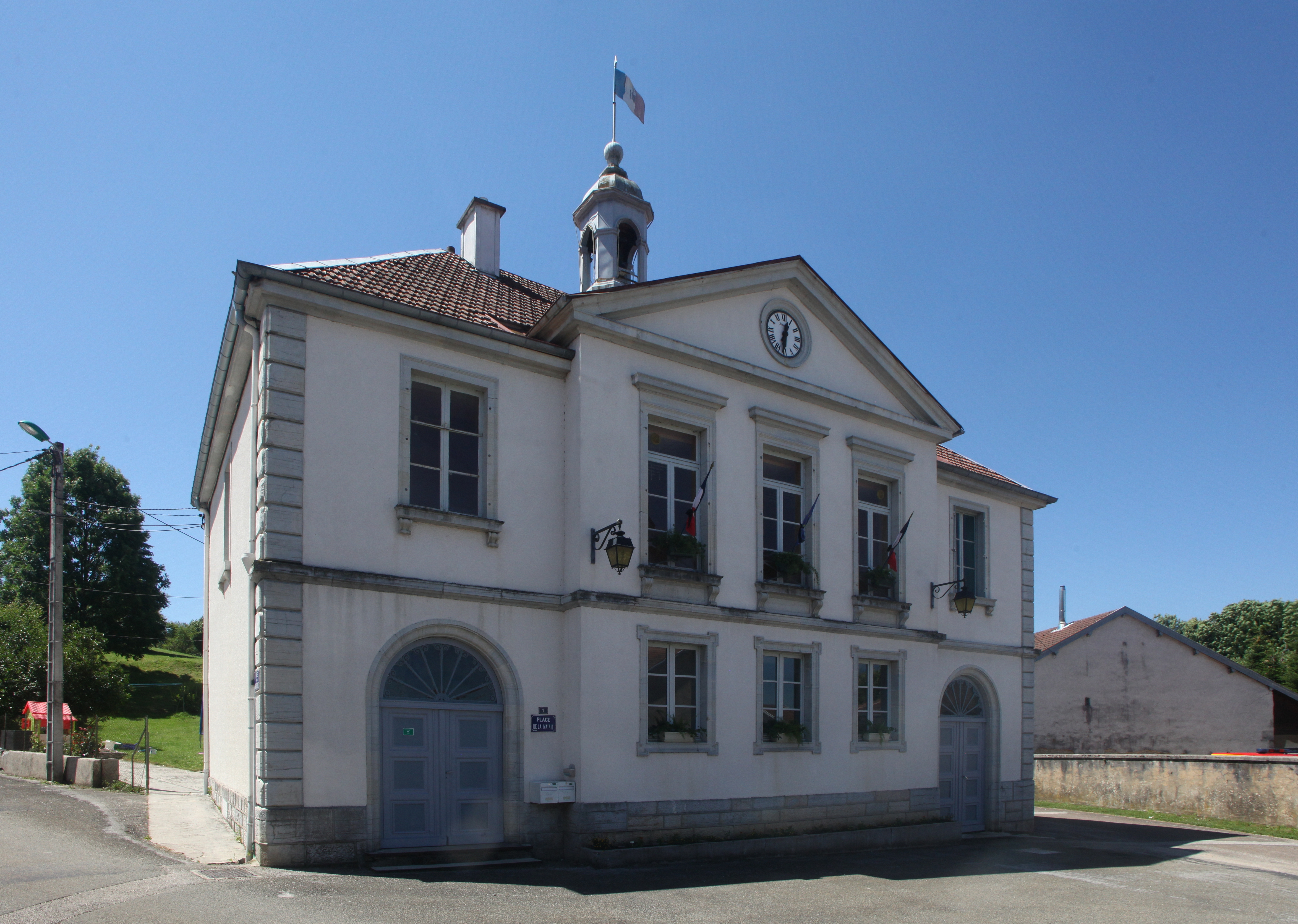 Mairie de Sapois (Jura).